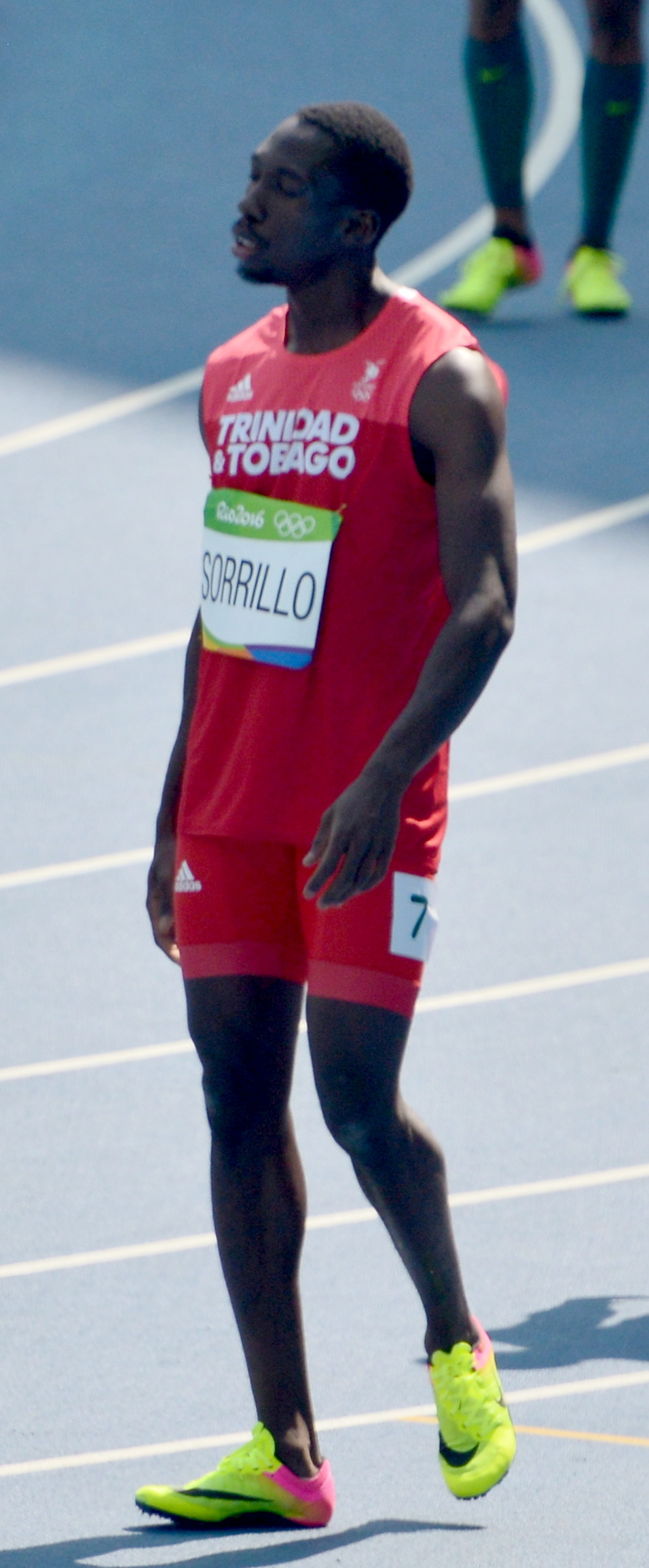 Séries du 200m Homme aux JO de Rio 2016